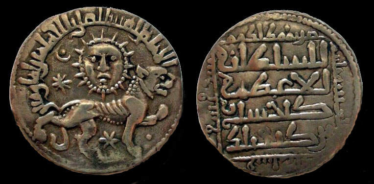 Kaykhusraw II dirham, minted at Sivas 638 AH/1240-1241 AD.